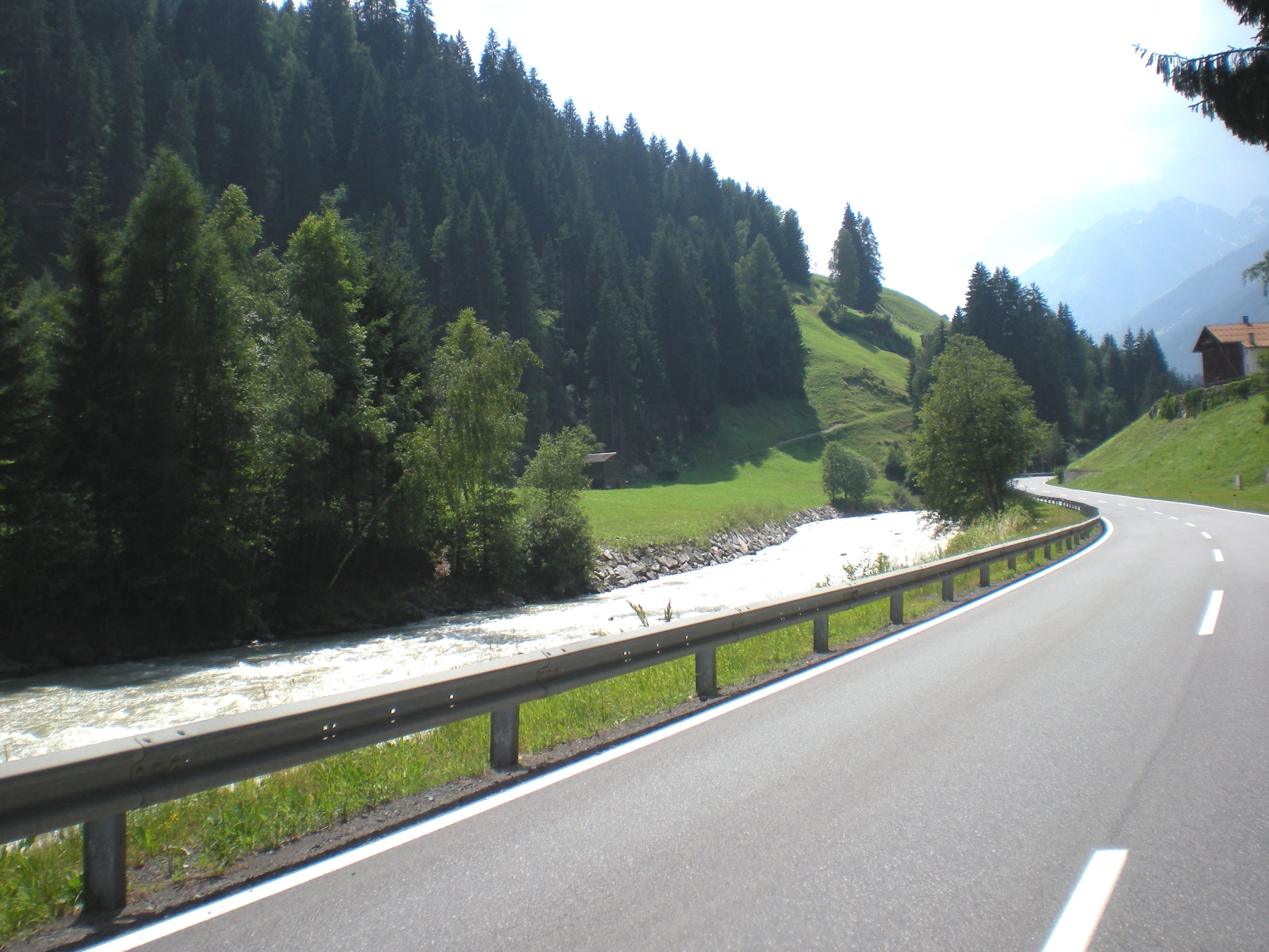 La B188 (Silvretta Hochalpenstrasse) es una de las carreteras más espectaculares del Tirol, sobre todo en el tramo de peaje, que incluye un total de 27 pronunciadas curvas.